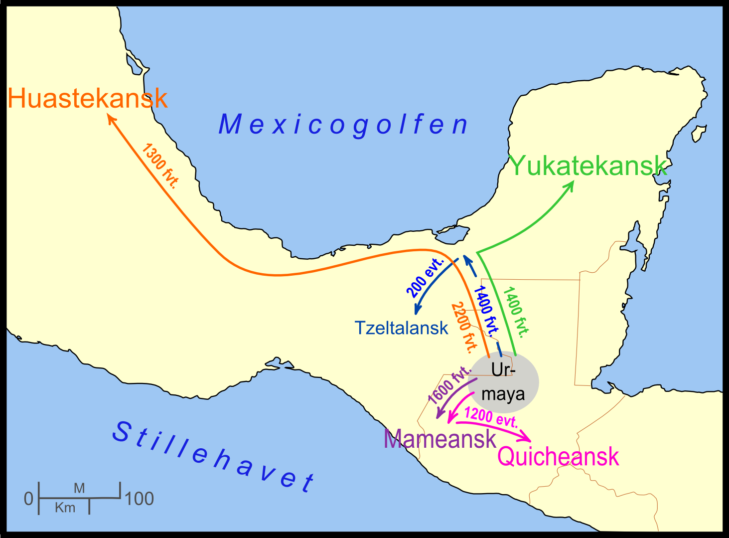 Kart som viser Kaufmanns teori om de mayiske språkas migrasjonsruter.